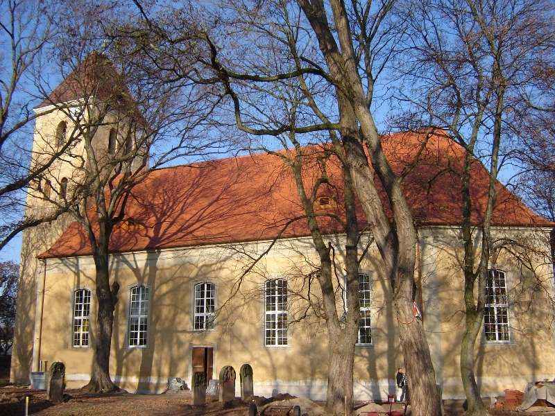 Laurentiuskirche Magdeburg-Olvenstedt